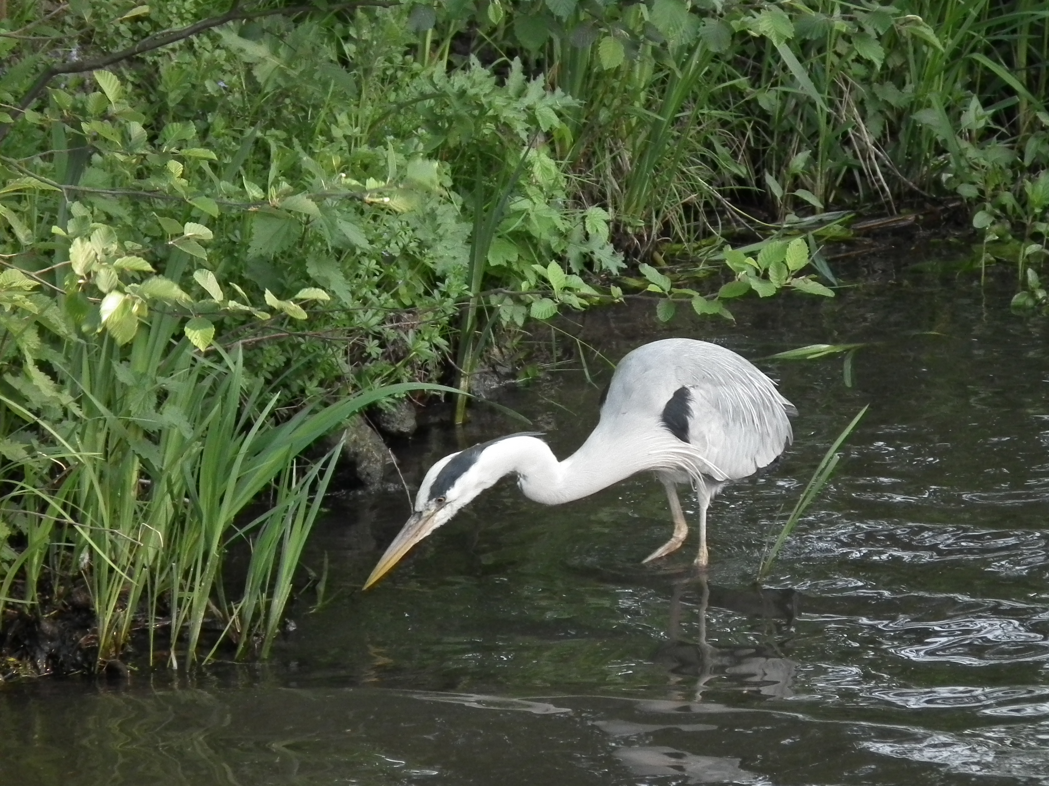 Graureiher